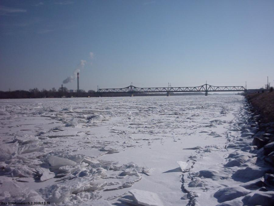 Eisstöße auf der Wiener Donau im Jänner/Februar 2006.